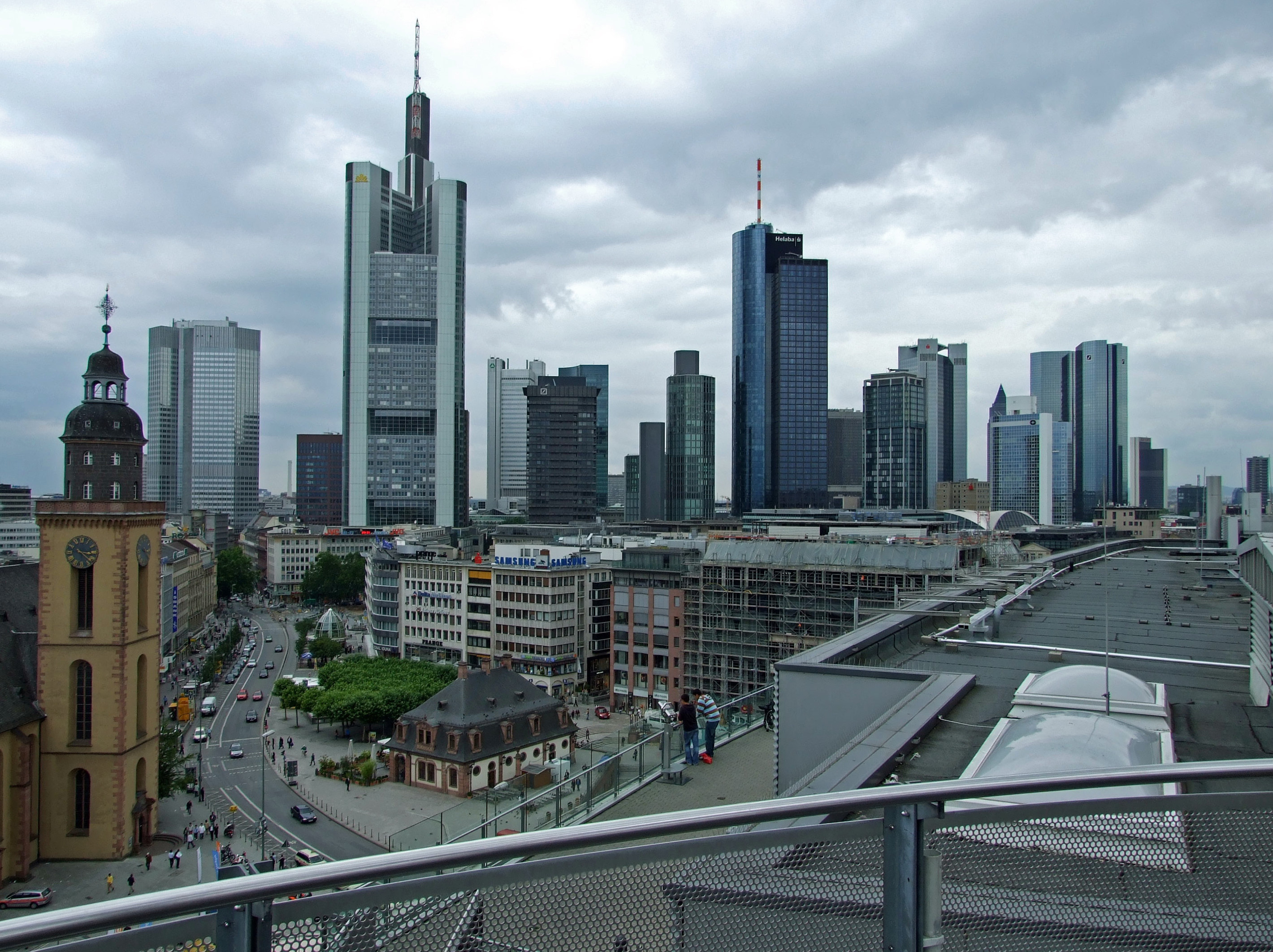 Innenstadtpanorama von der Zeilgalerie